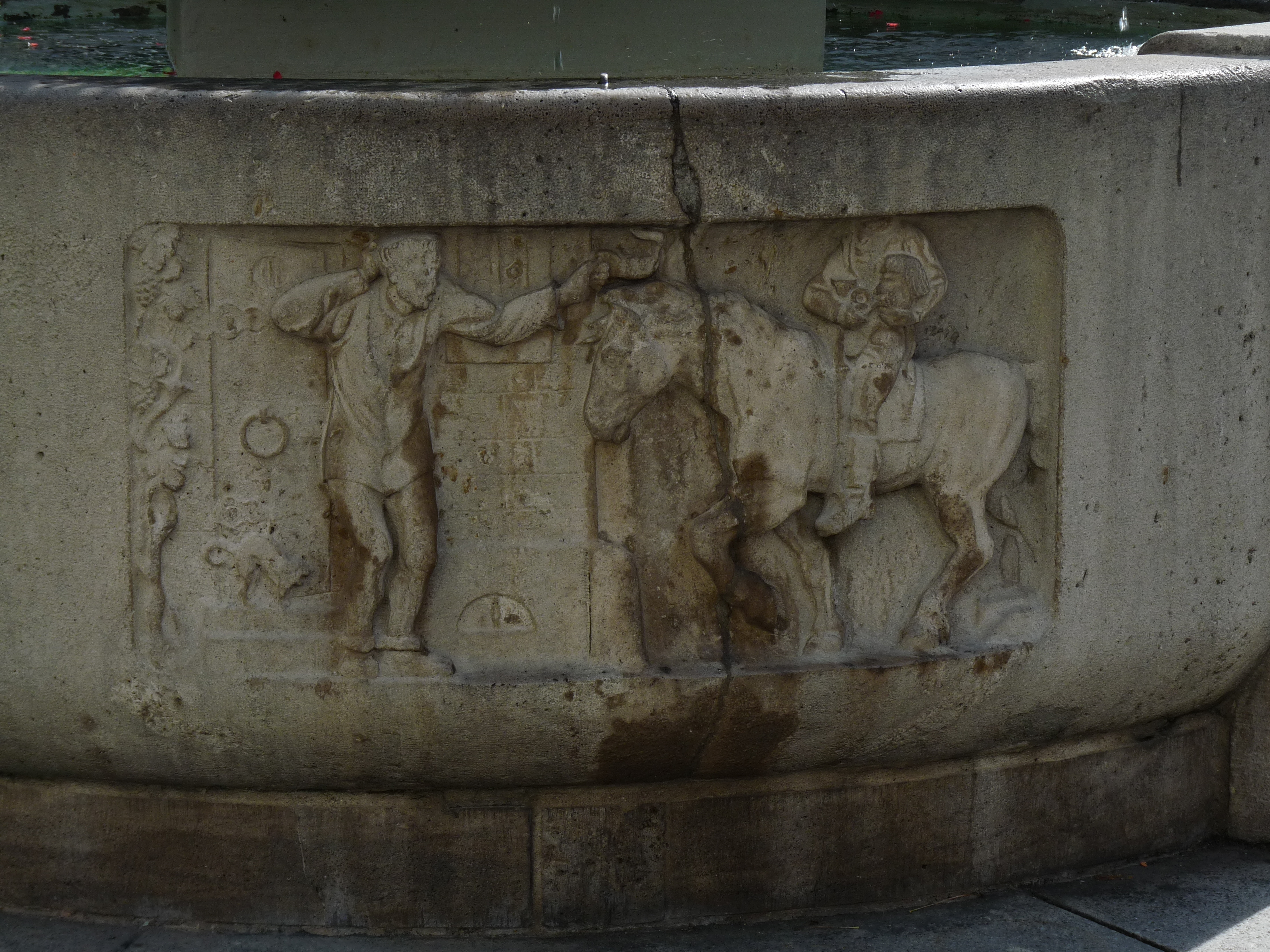 Esslingen - Postmichelbrunnen - Szene 4 - Postmichel erscheint Kopflos.